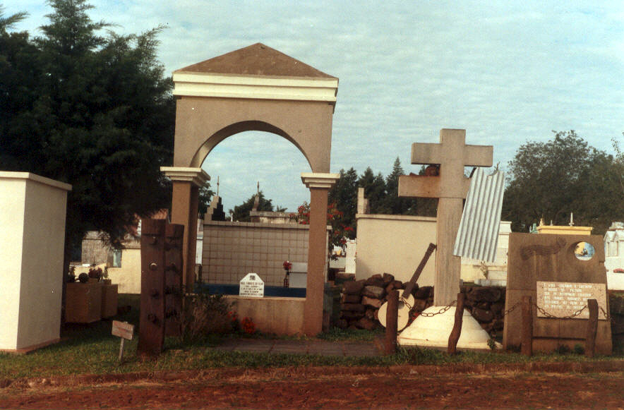 Túmulo e Memorial ao grande payador missioneiro Noel Guarany na cidade de Bossoroca, sua terra natal.